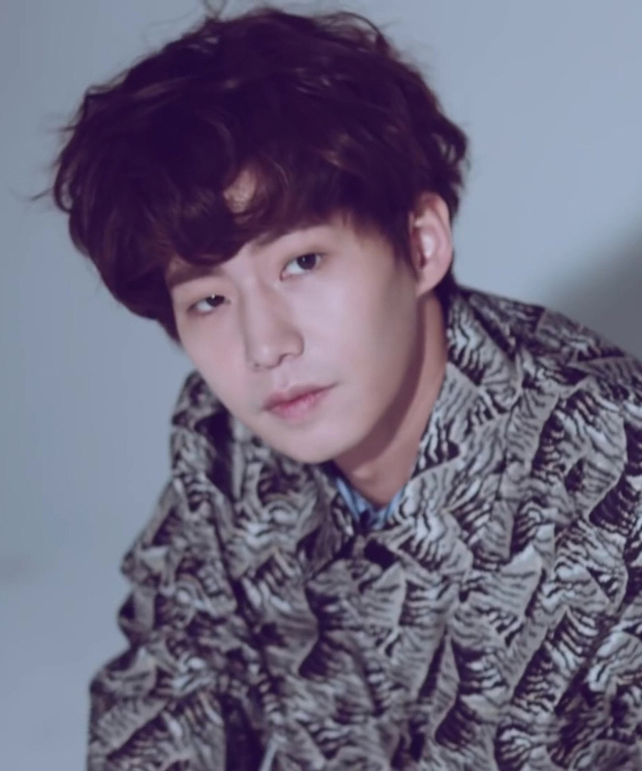 (Marie Claire Korea) 변화하는 송재림